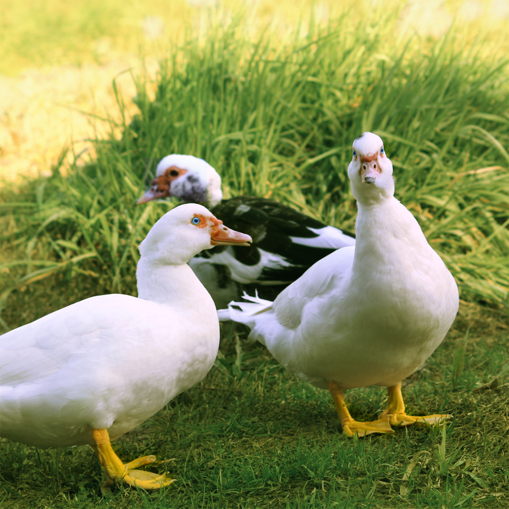 Zaragoza, España